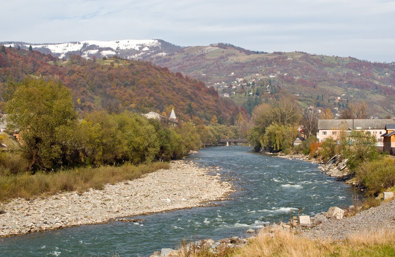 Rakhiv, Zakarpats'ka oblast, Ukraine, 90600